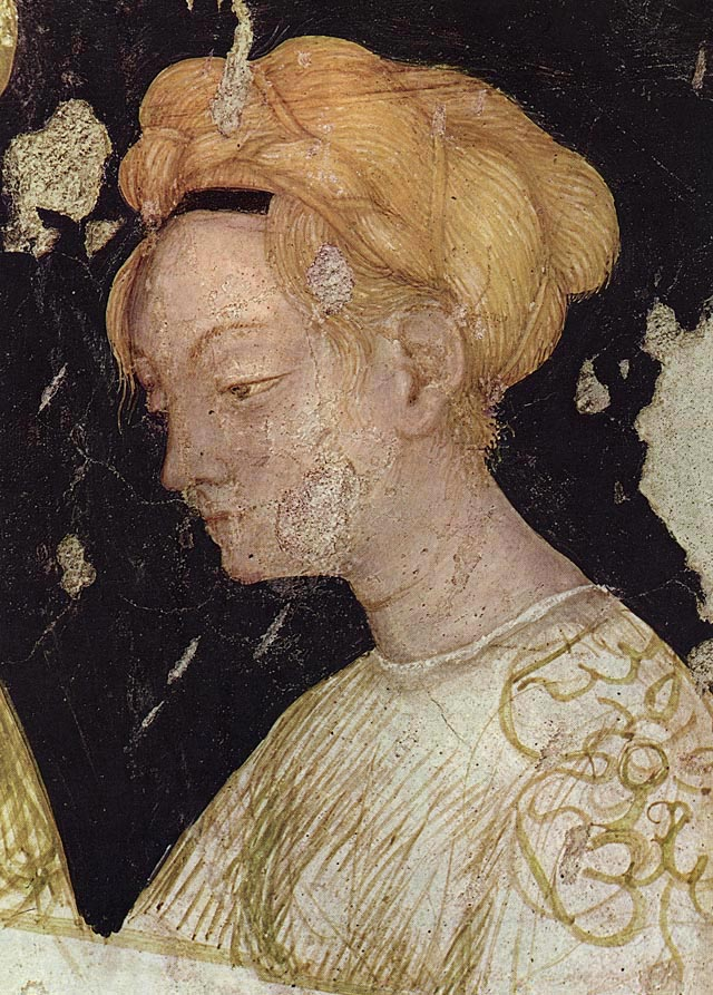 pisanello, Torneo-battaglia di Louverzep in the Palazzo Ducale, Mantua